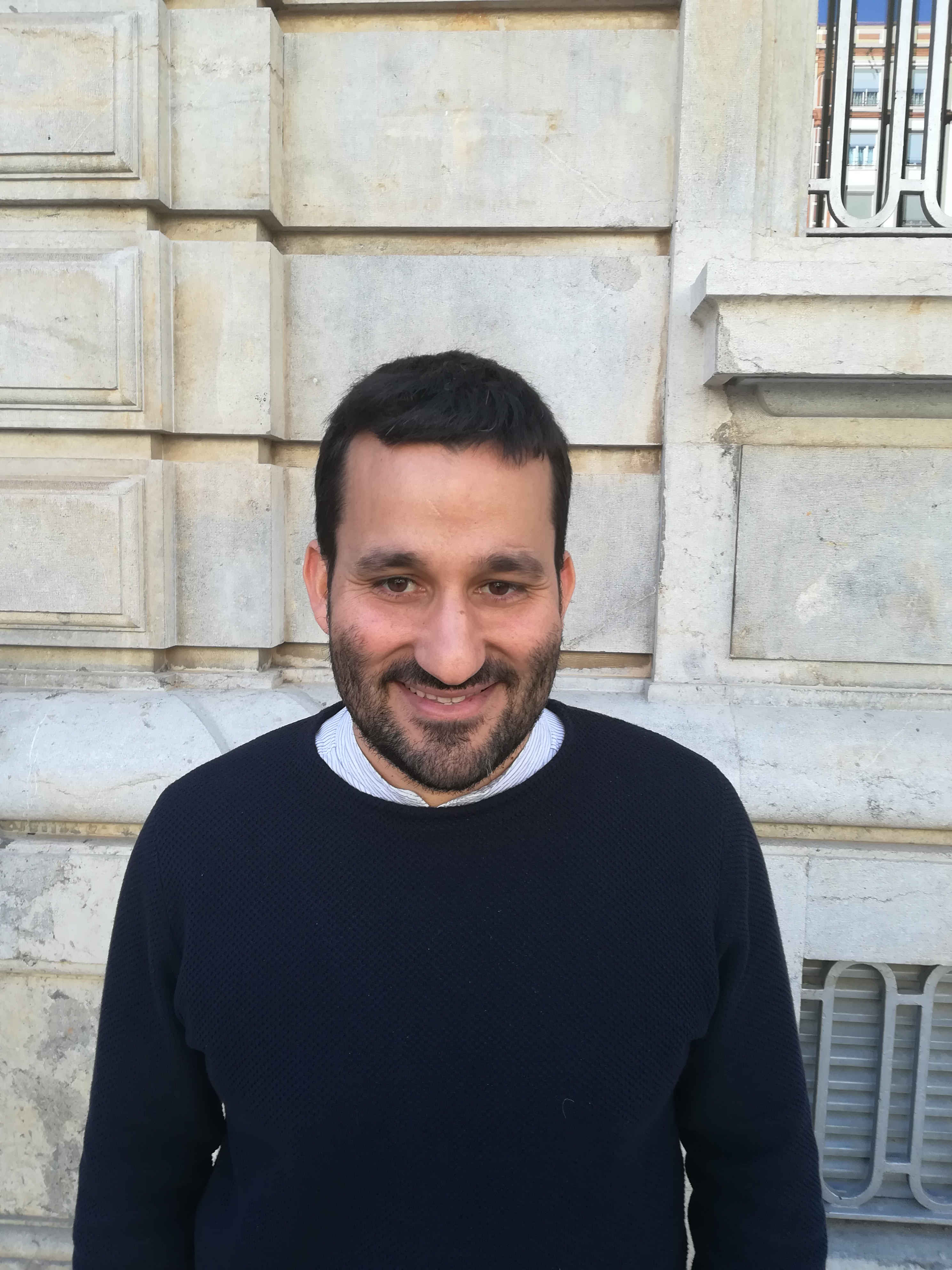 Vicent Marzà i Ibáñez